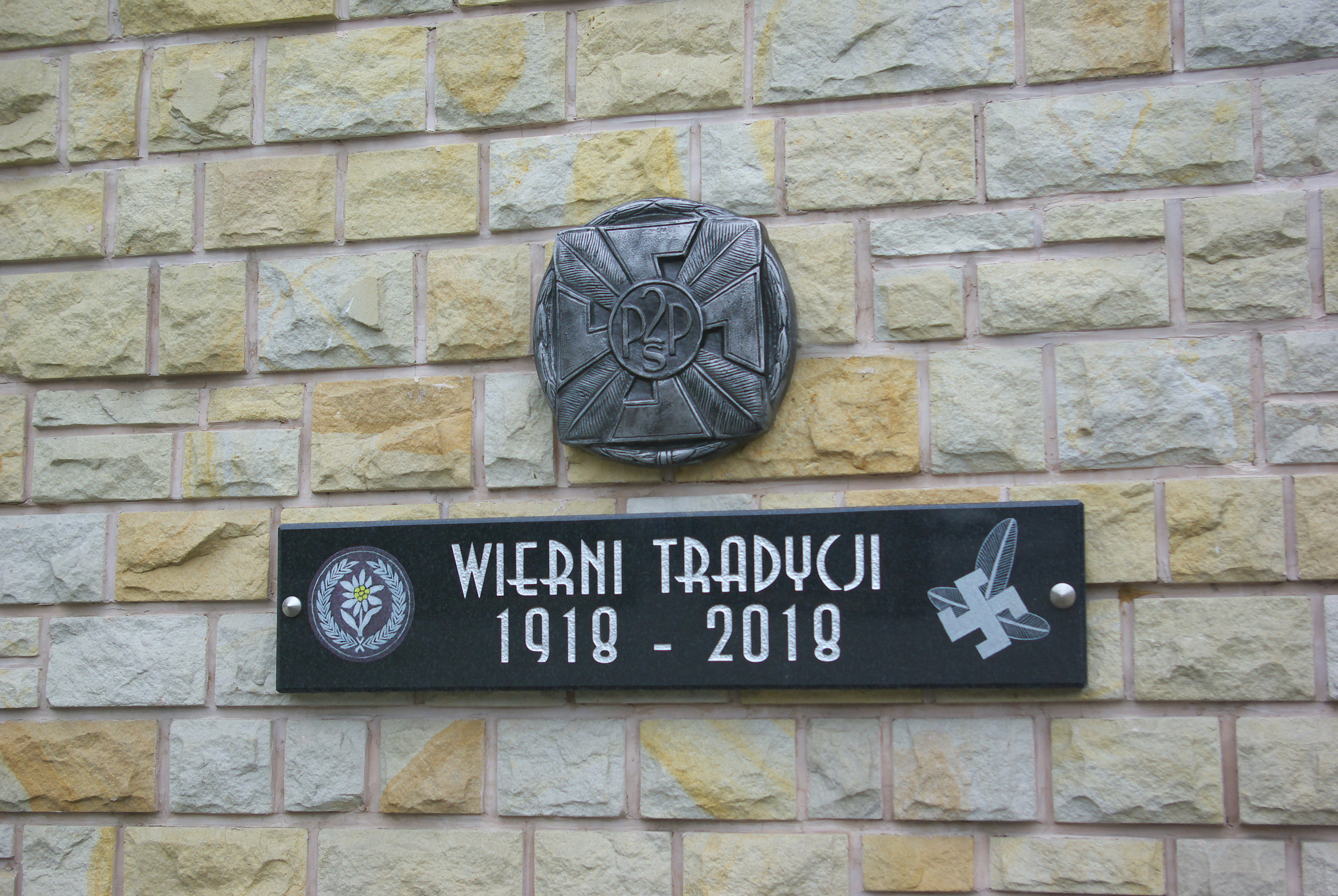 Upamiętnienie 2psp w Sanoku.